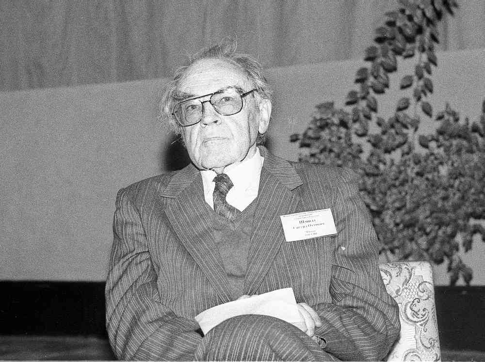 Академик Российской академии образования историк Сигурд Оттович Шмидт сидит в президиуме на конференции «Малые города России». Переславль, улица Свободы, дом 46, кинотеатр «Восток».